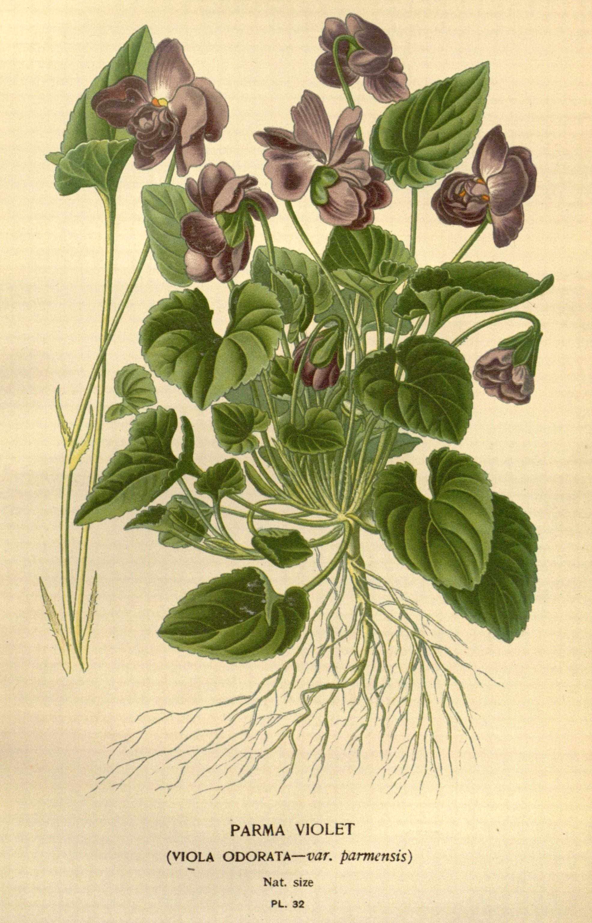 PARMA VIOLET (VIOLA ODORATA — var. parmensis) Nat. size PL. 32